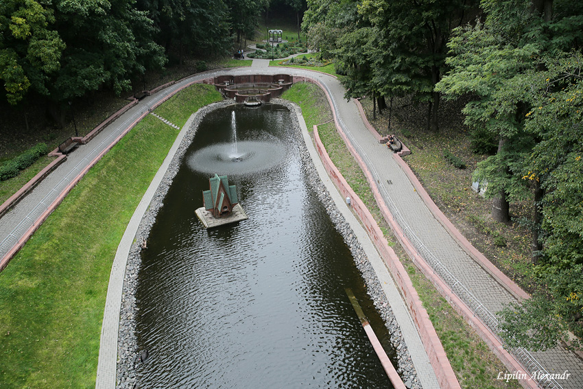 Гомельскі палацава-паркавы комплекс